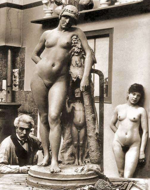 Anonymous or Louis Bonnard, Jean-Léon Gérôme with a model in frontal view, posing for ‘Omphale,’ plaster seen in frontal view, ca. 1885. Albumen silver print. Département des Estampes et de la Photographie, Bibliothèque Nationale de France, Paris. [Dc-293 (a+) – Fol., tome 27].